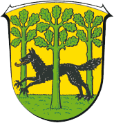 Wappen von Wolfhagen